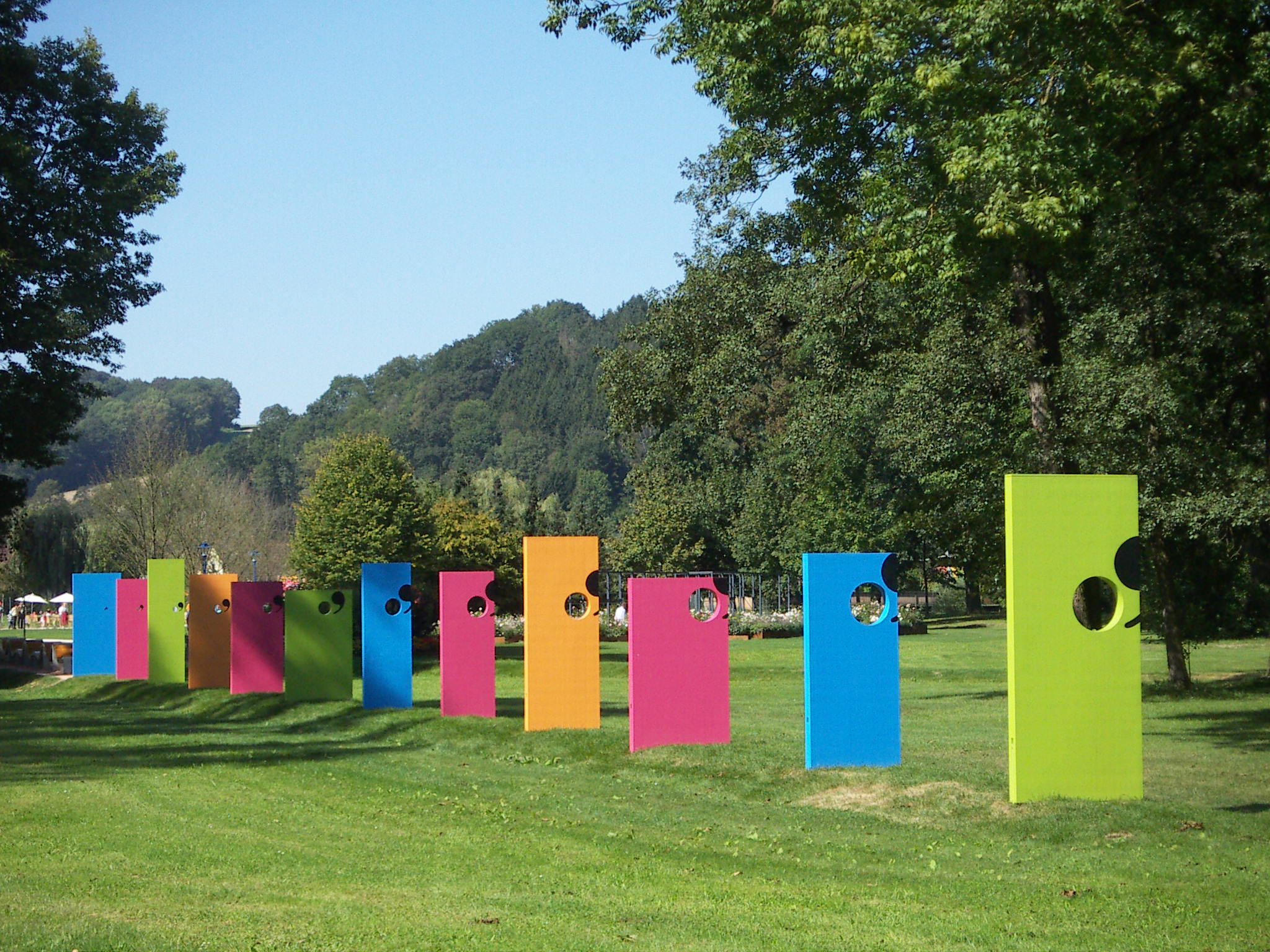 Kunst zum Thema LINZ 09 in der Gartenausstellung BOTANICA 2009 in Bad Schallerbach